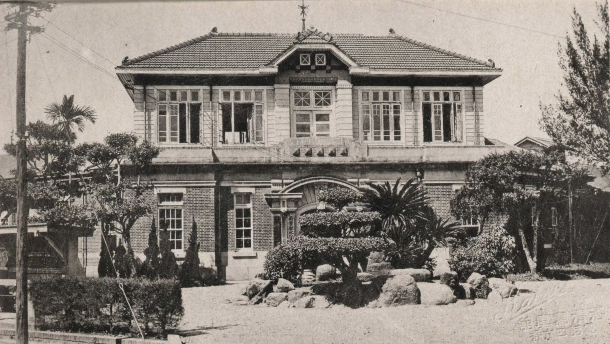 新營郡役所，翻拍自1939年的《新營郡要覽》